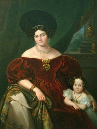 Елена Николаевна Апраксина, ур. Безобразова (1800/1801-1891), в 1 браке была замужем за графом Александром Петровичем Апраксиным (1784/1793-1845); во 2 браке с 1841 года за графом Иосифом Эстергази (1791-1847), с дочерью Юлией.